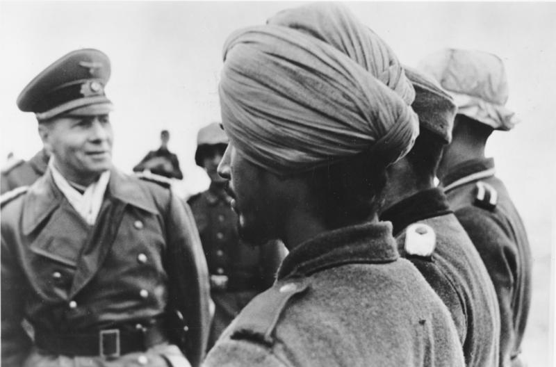 [Text Scherl:[ Generalfeldmarschall Rommel an der Biscaya Auf seinen Besichtigungsfahrten überprüft Feldmarschall Rommel nicht nur unsere Verteidigungsanlagen an der Küste, sondern überzeugt sich auch vom Stand der Ausbildung der Truppen. UBz: Generalfeldmarschall Rommel bei der Besichtigung einer Einheit "Freies Indien", die sich aus indischen Freiwilligen zusammensetzt. PK-Jesse [Text ADN:] Zentralbild: II. Weltkrieg 1939-45. Im besetzten Frankreich, Februar 1944. Generalfeldmarschall Erwin Rommel besichtigt eine Einheit der "Indischen Legion". (Die indische Legion wurde aus in Europa lebenden Indern gebildet) Abgebildete Personen: Rommel, Erwin: Generalfeldmarschall, Ritterkreuz (RK), Heer, Deutschland (GND 118602446)